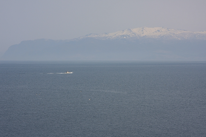 弁慶岬より遠望する雷電山